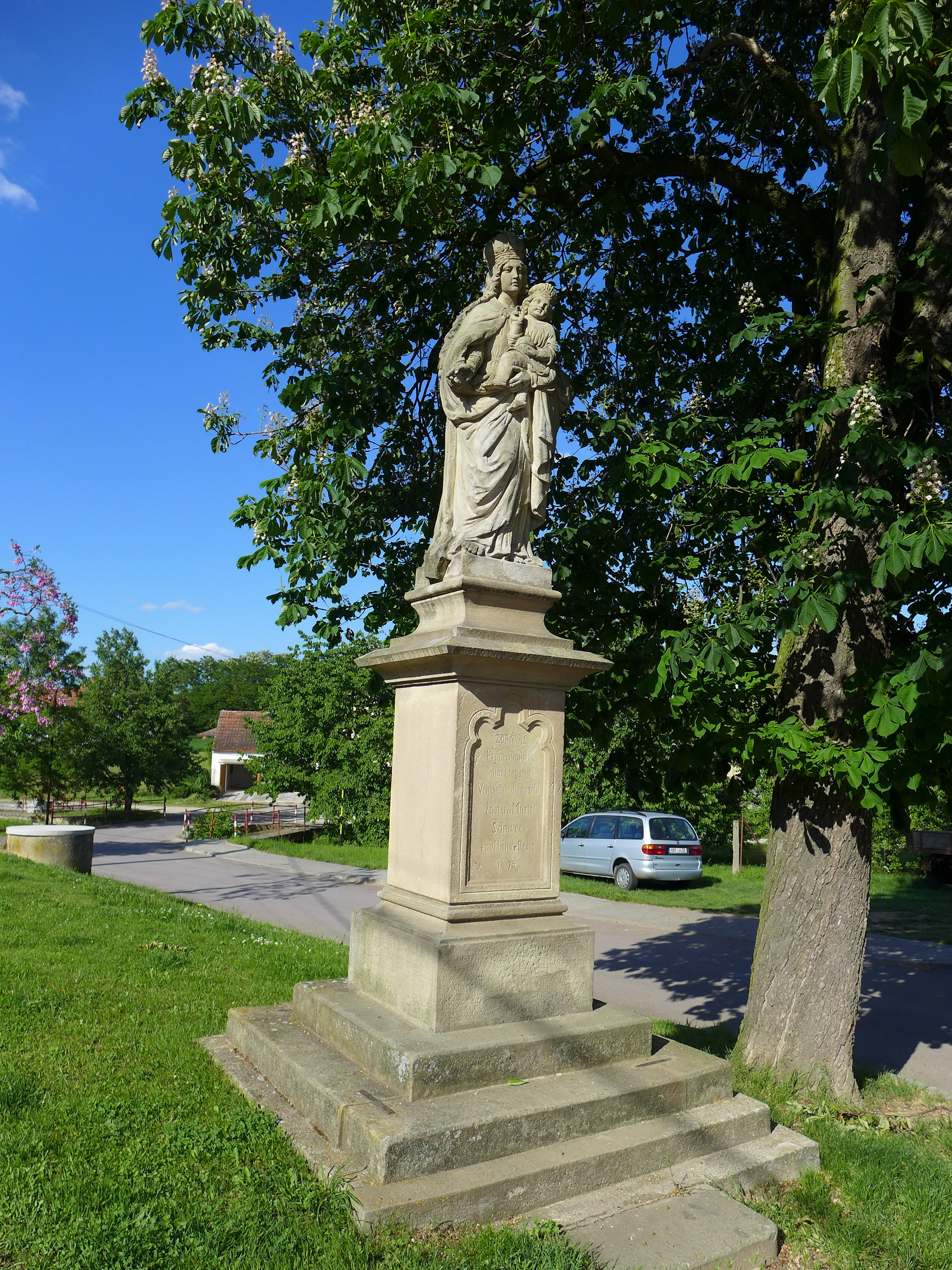 Socha Panny Marie, Rešice.